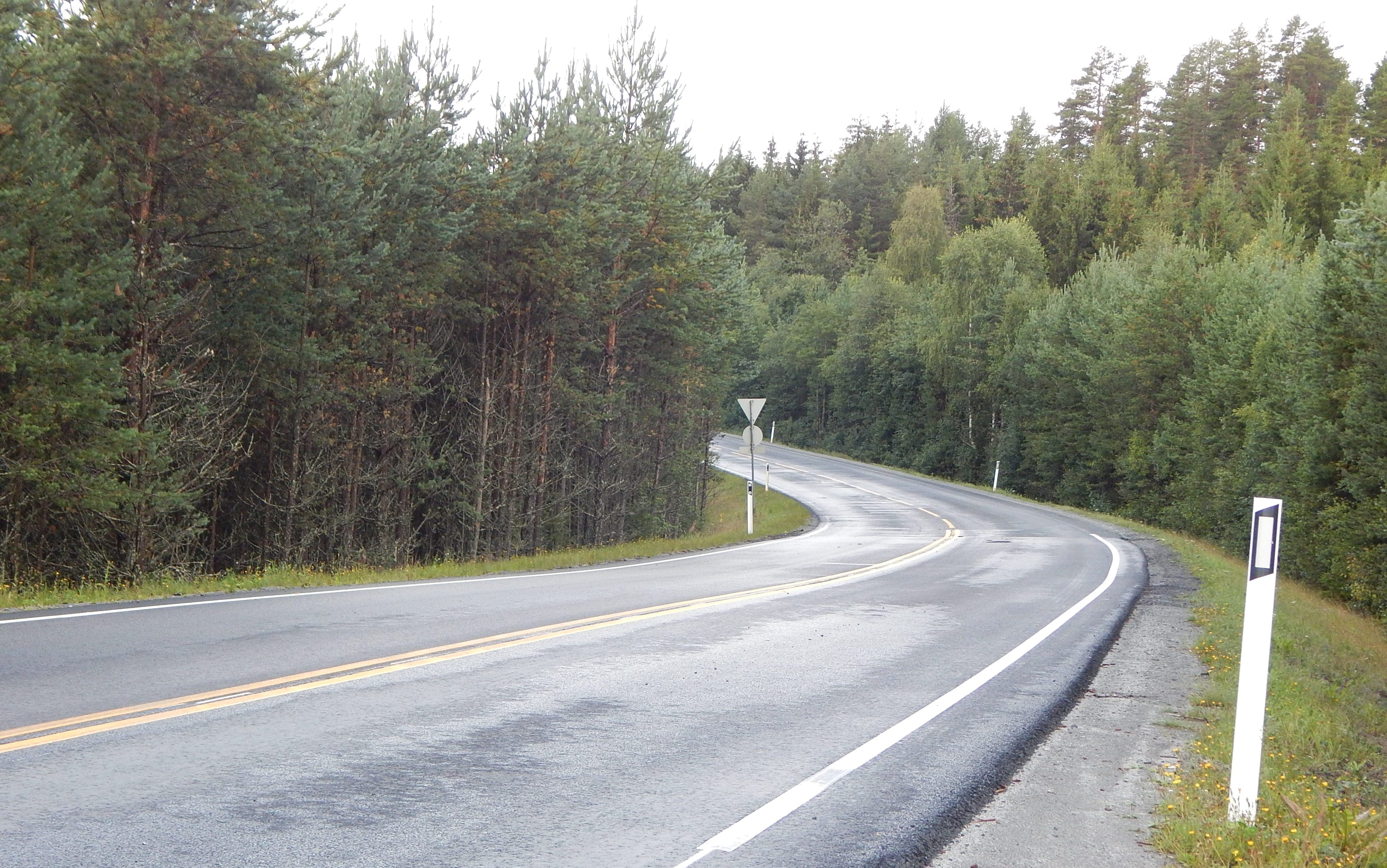 Sørlivegen (fylkesvei 1902, tidl. 232) like vest for E6